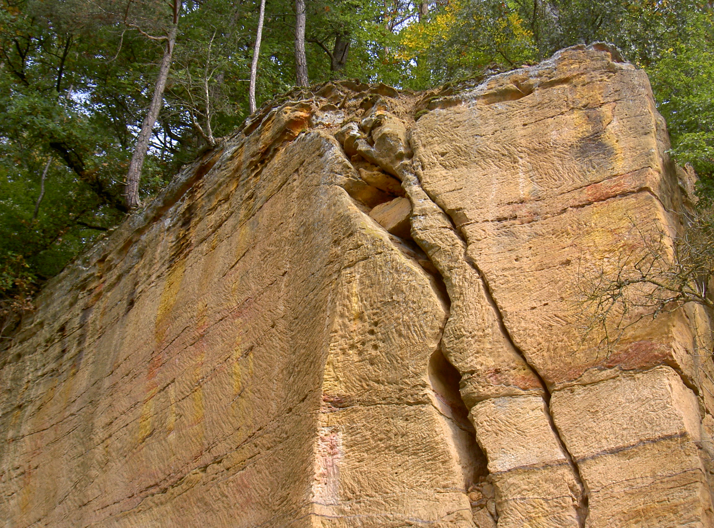 Sandsteinwand Grünwald